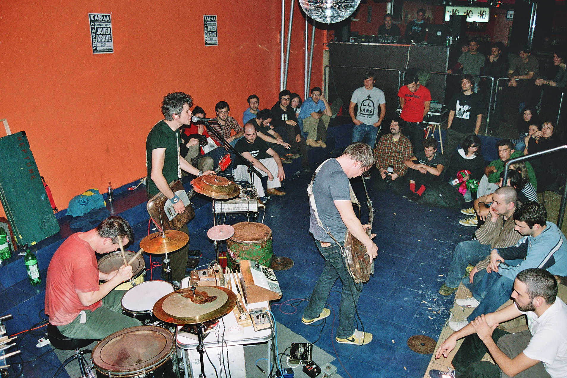 concerto de Neptune en Pontevedra